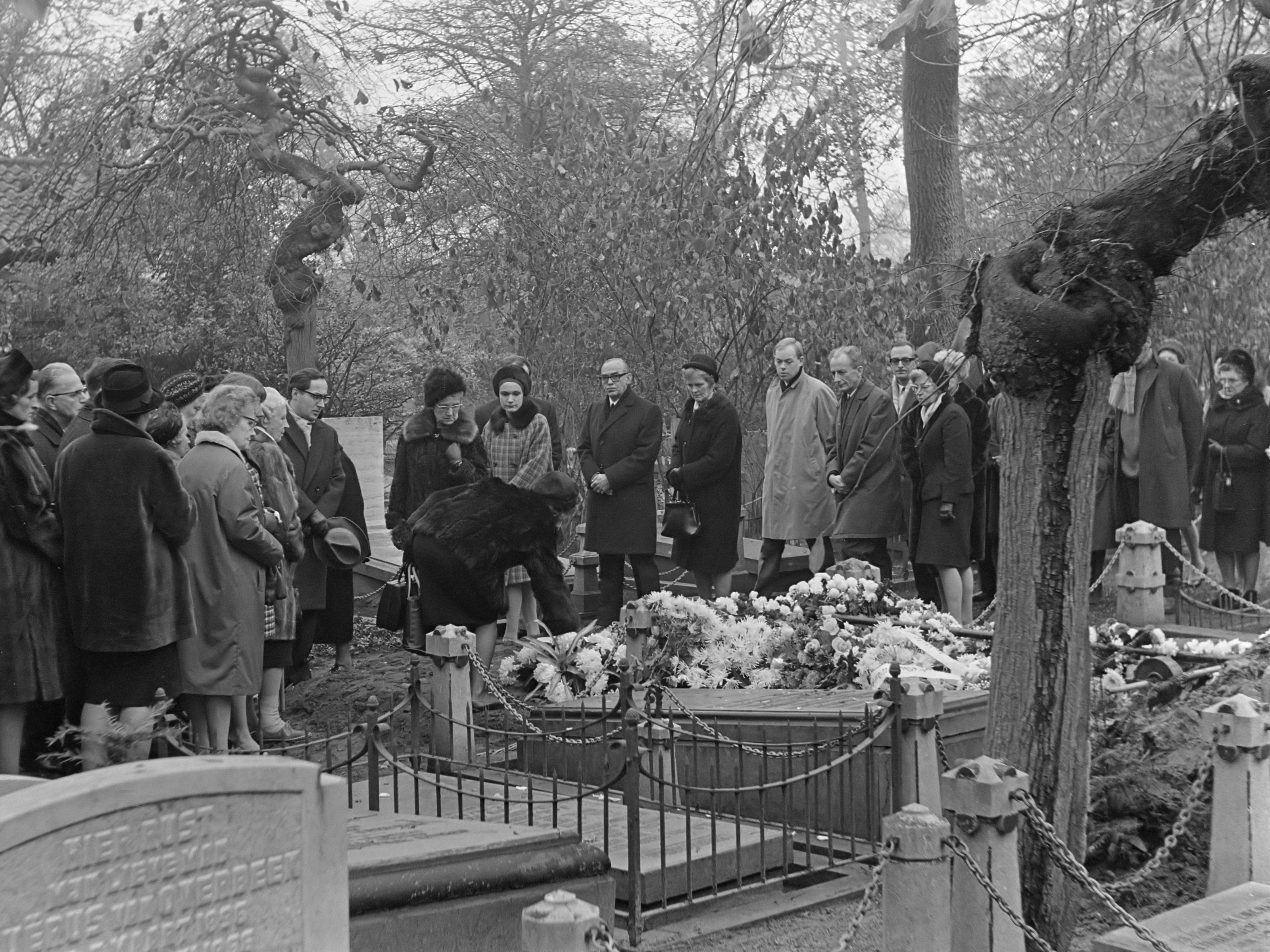 Begrafenis Margaretha (Greet) Hofmans op "Zorgvliet" te Amsterdam 21 november 1968